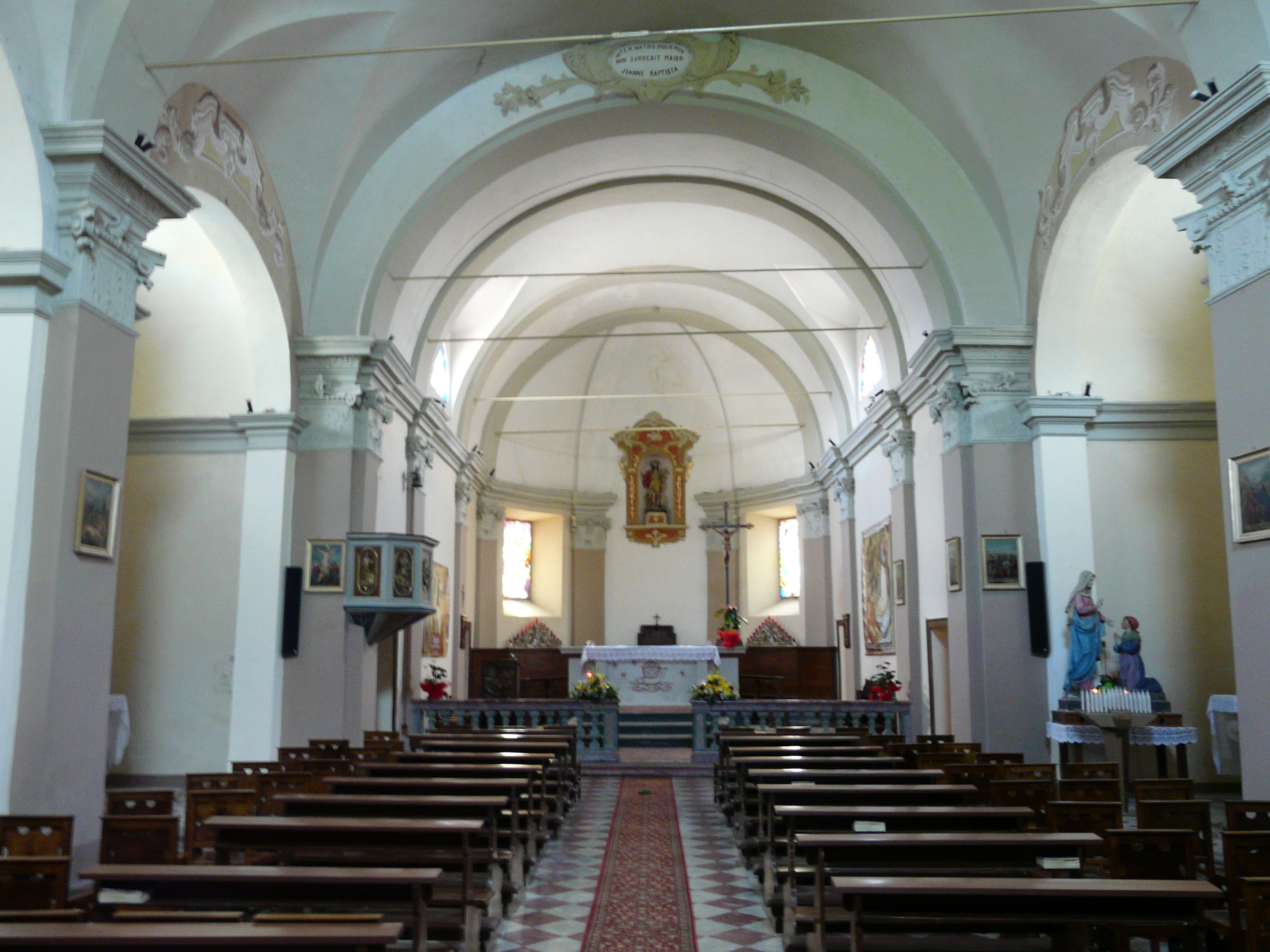 Chiesa di San Giovanni Battista di Bardi, Emilia-Romagna, Italia